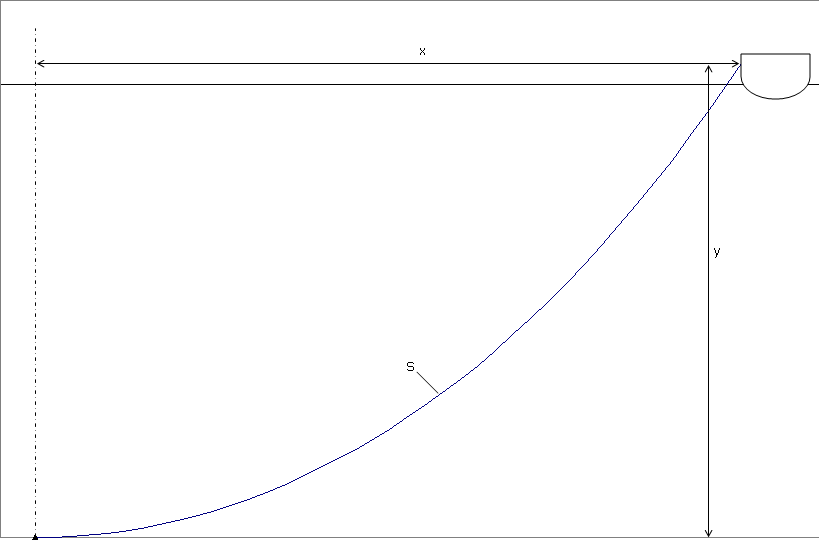 Own work.